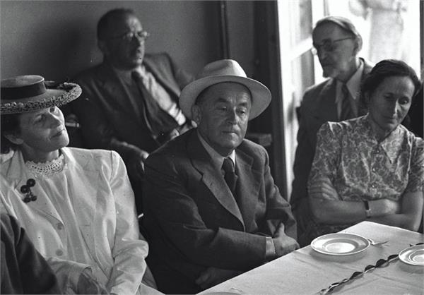 ירושלים - מר עגנון, חתן פרס אוסישקין לשנת תש"ו